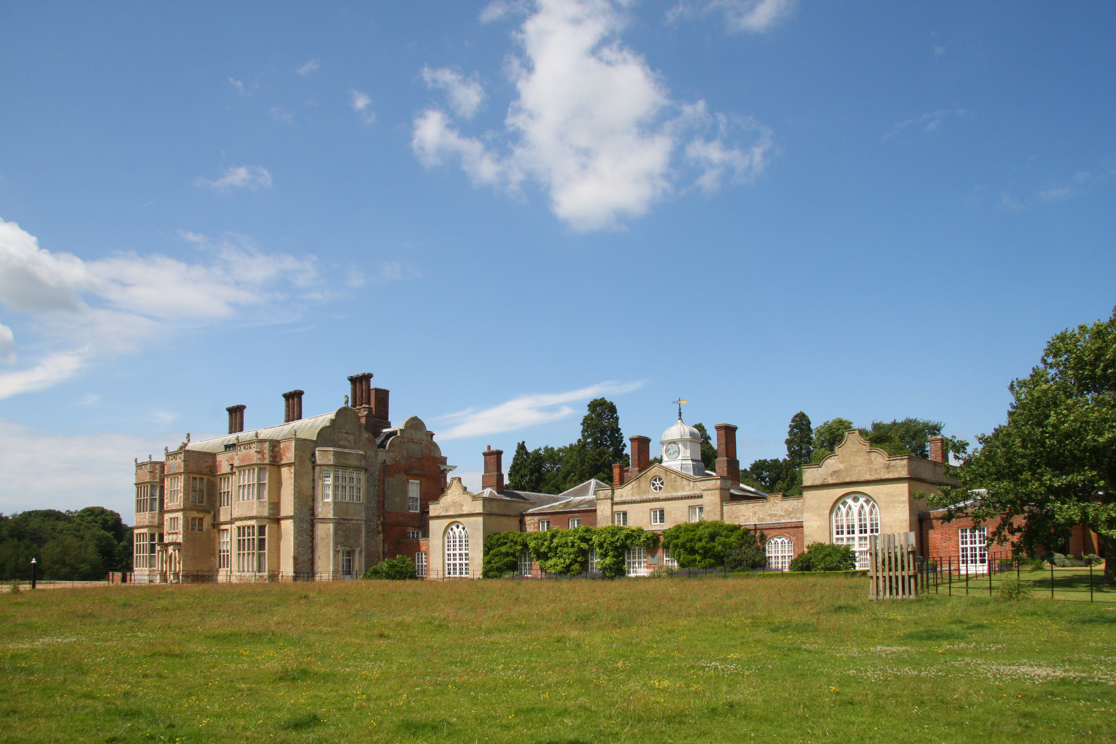 Felbrigg Hall